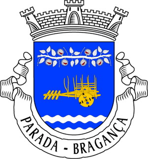 Brasão de Parada de Infnções